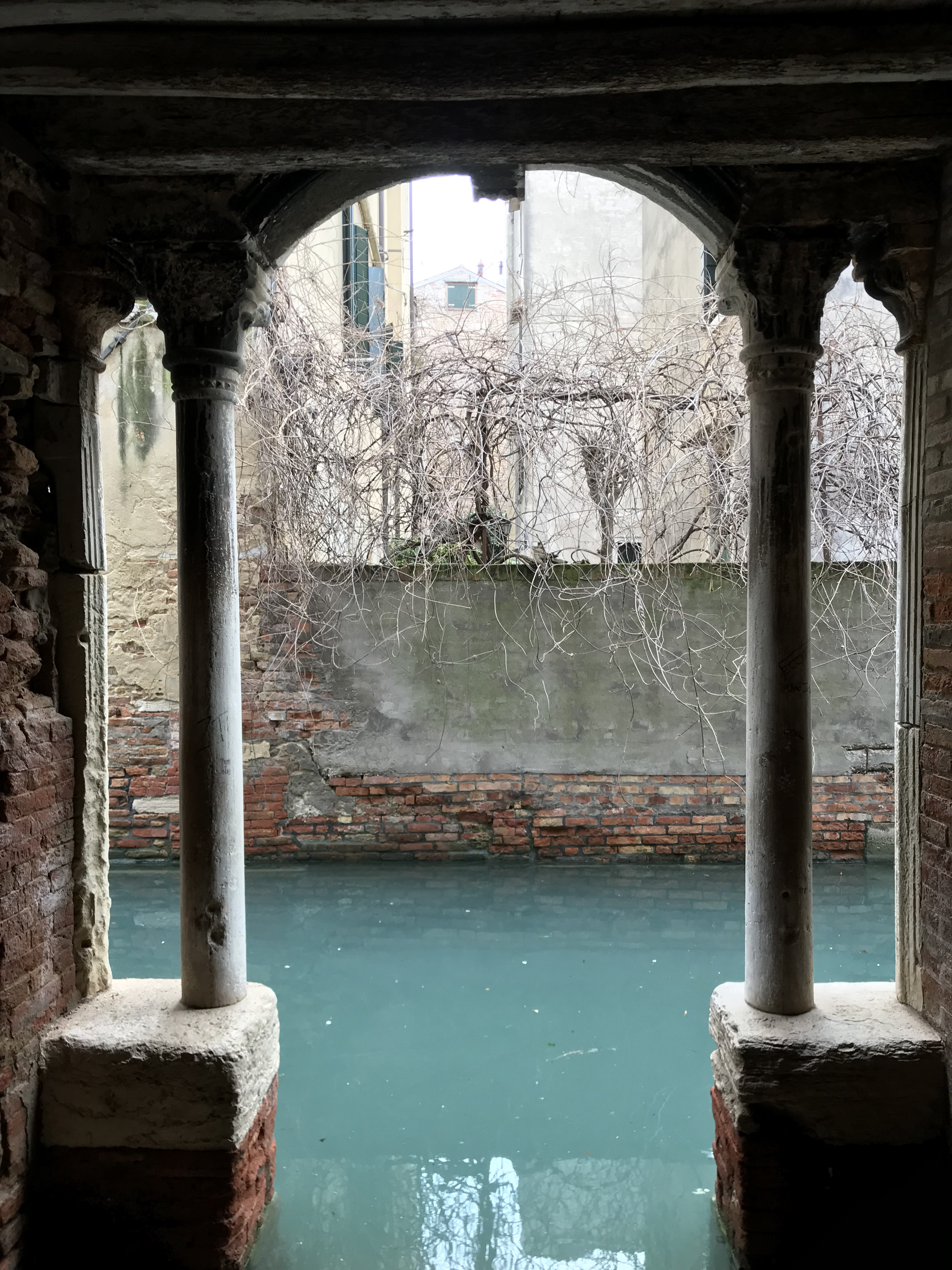 Venezia Sotoportego dei Nizioleti: porta sull'acqua